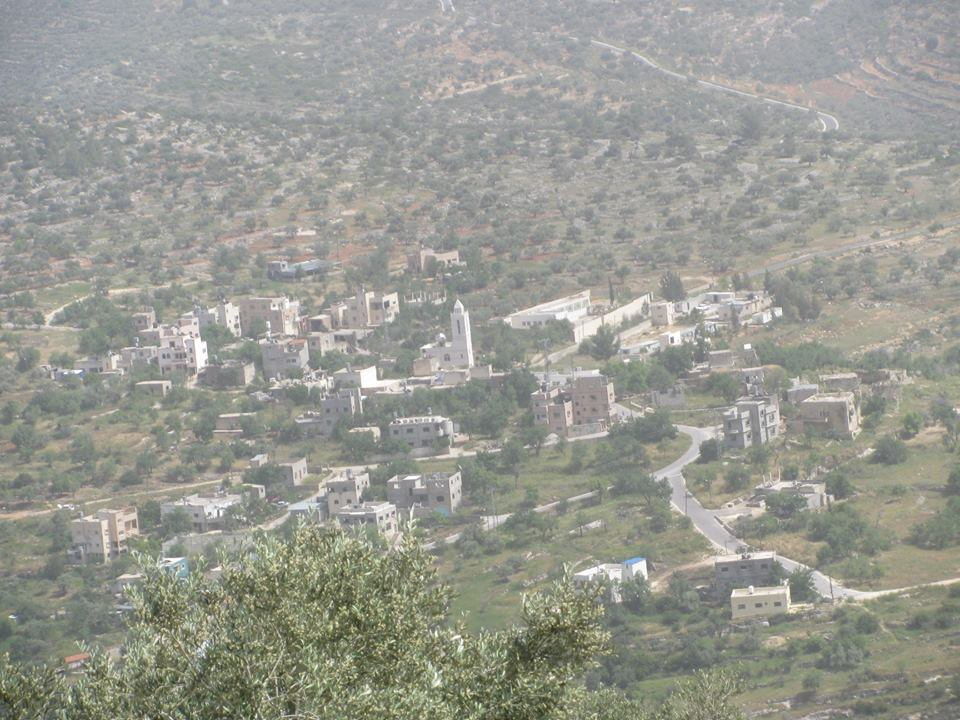 منظر عام للقرية